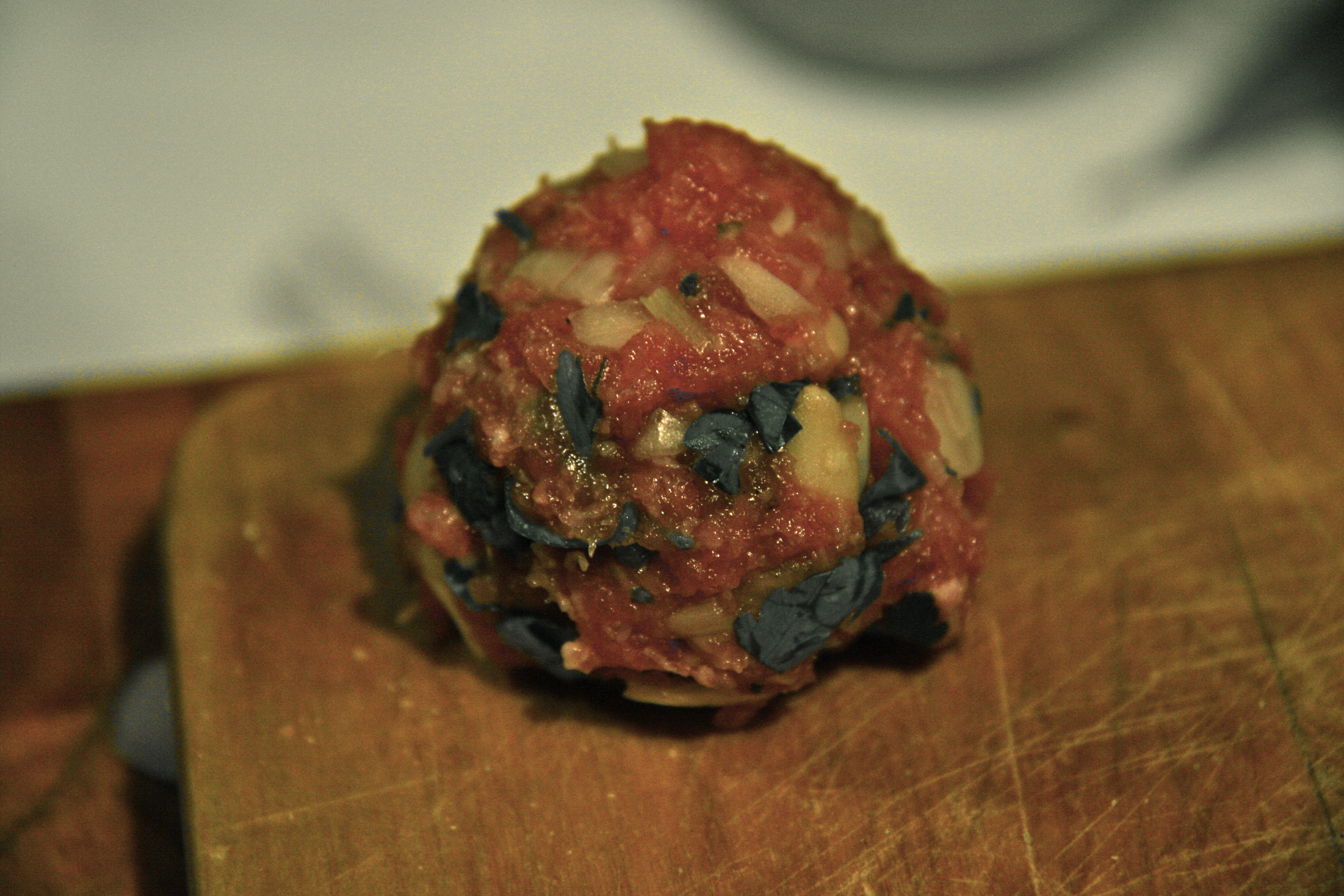 Albóndiga - Cruda (cebolla y perejil)